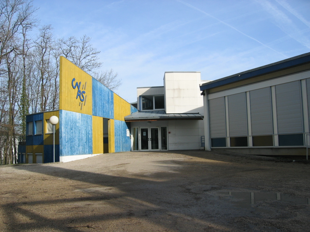 CNRS de Besançon